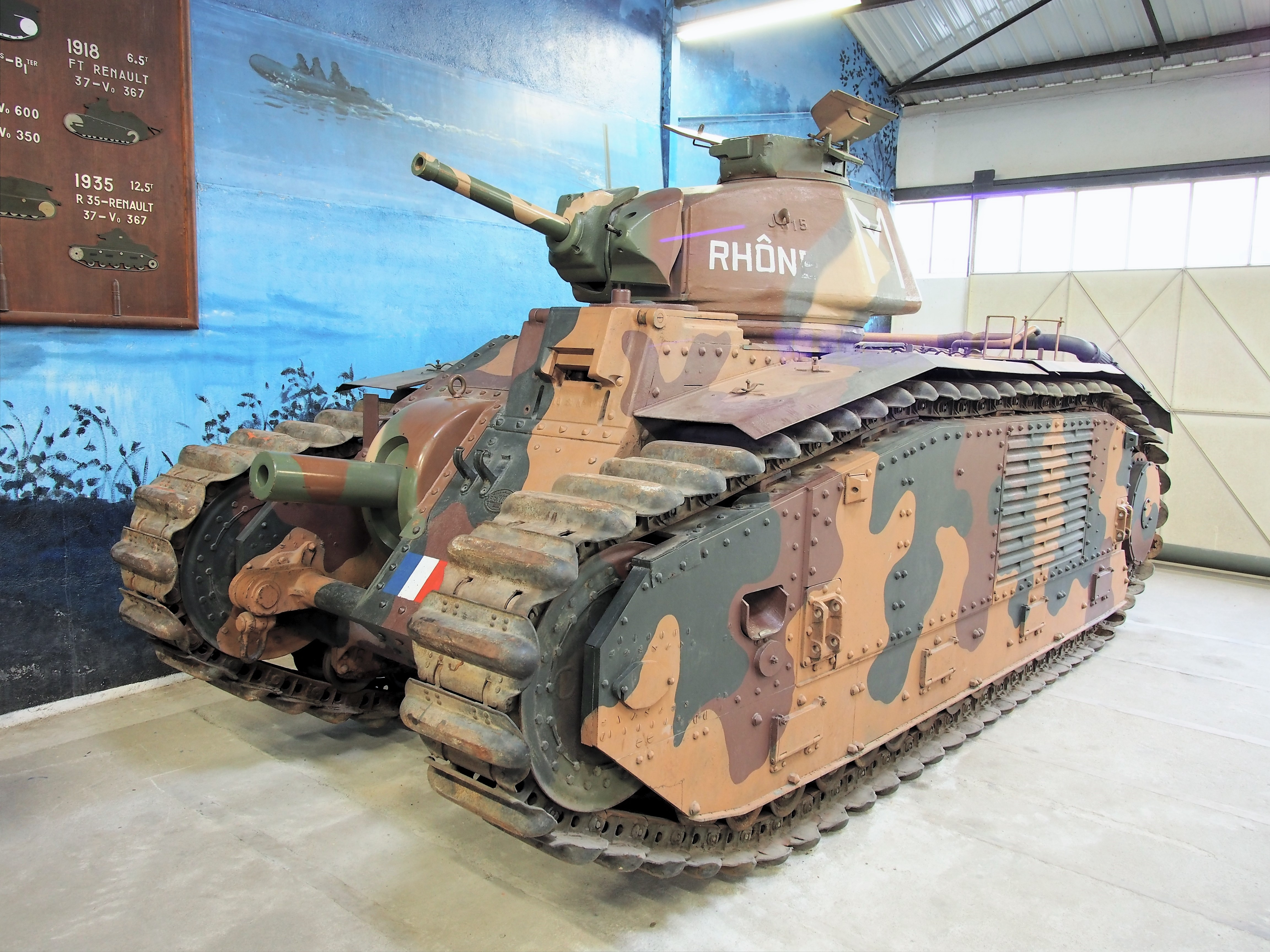 Renault B1 bis in the Musée des Blindés, France.